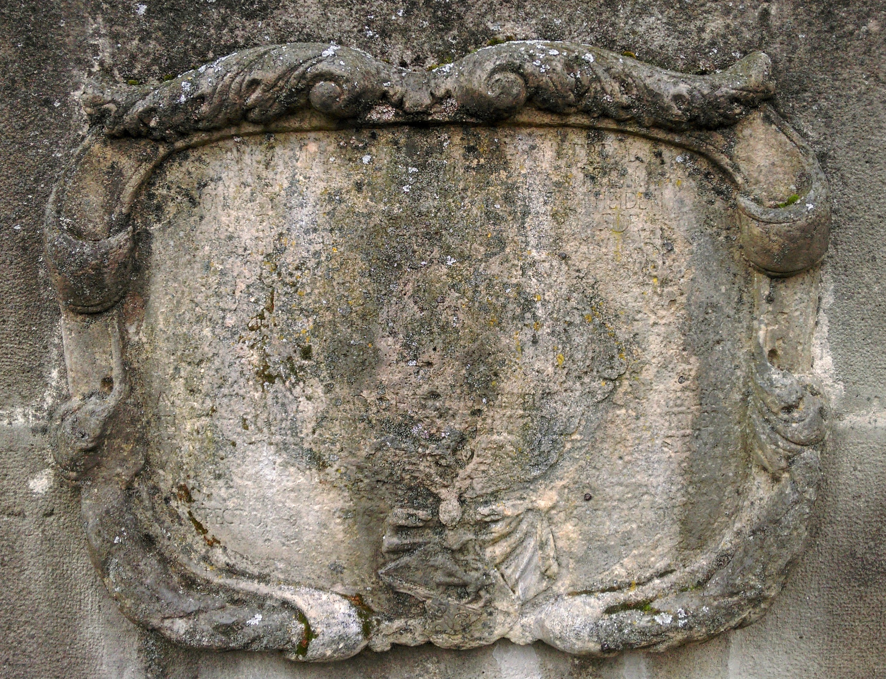 Sousoší Krista s Pannou Marií od Jeana Baptista Dusarta, Chobot, Kroměříž.